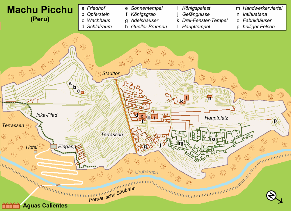 Deutsche Version der Karte von Machu Picchu